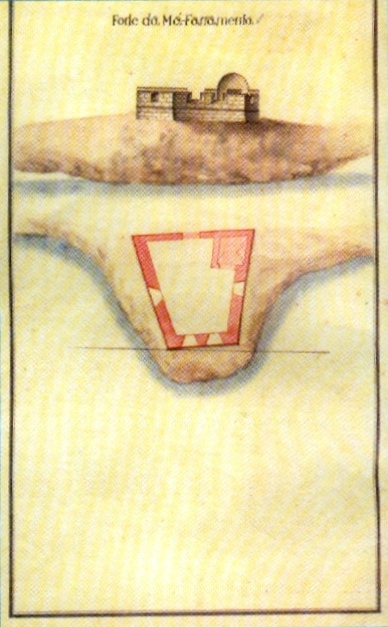 "Forte da Má Farramenta", s/d, autor desconhecido, Arquivo Histórico Militar, Lisboa. in MARTINS, José Salgado, "Património Edificado da Ilha Terceira: o Passado e o Presente". Separata da "Atlântida", vol. LII, 2007. p. 20. Também integrante da "Colecção de Plantas e Alçados de 32 Fortalezas dos Açores, por Joze Rodrigo d'Almeida em 1830", José Rodrigo de Almeida, 1830 (c.) GEAEM (346-1-8A-96), Lisboa, Portugal.